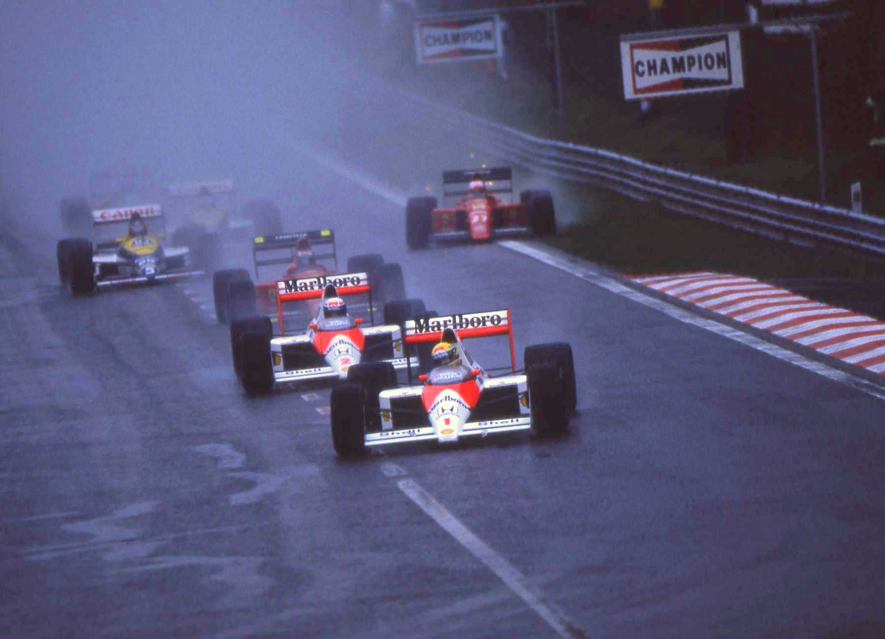 Ayrton Senna - McLaren-Honda devant Alain Prost - McLaren-Honda . Scan diapo argentique.